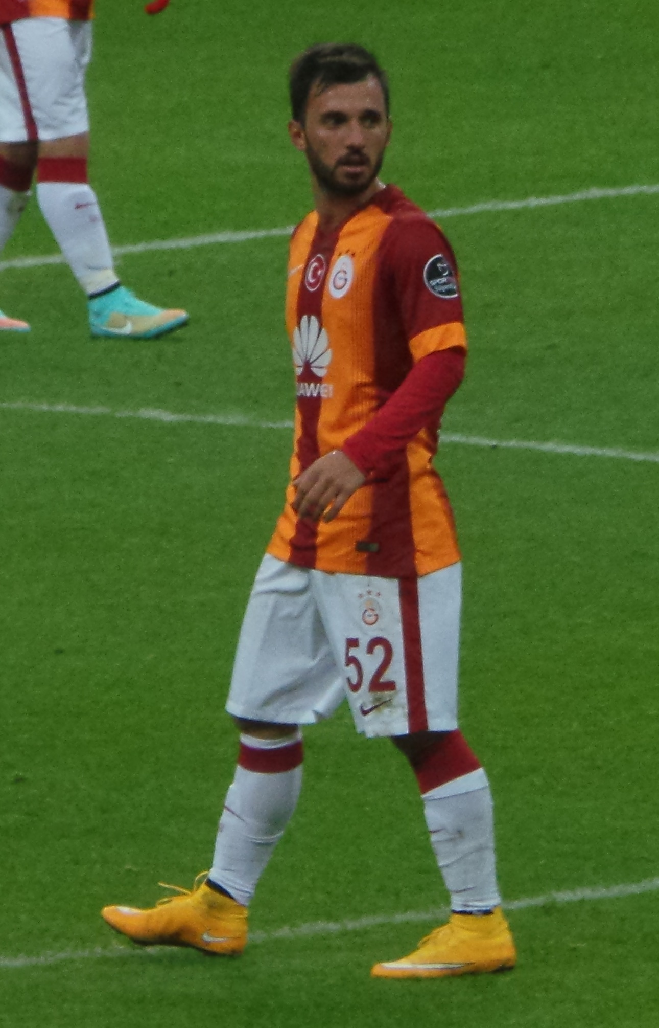 Emre Çolak